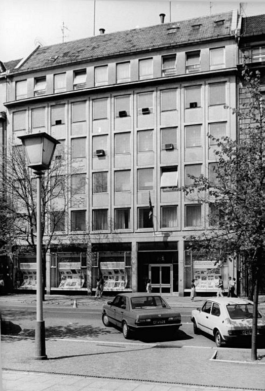 Berlin, Britische Botschaft ADN-ZB Schneider 3.1.87-Qua-Berlin: Botschaft des Vereinigten Königreichs von Groß-Britannien und Nordirland unter den Linden 32-34.